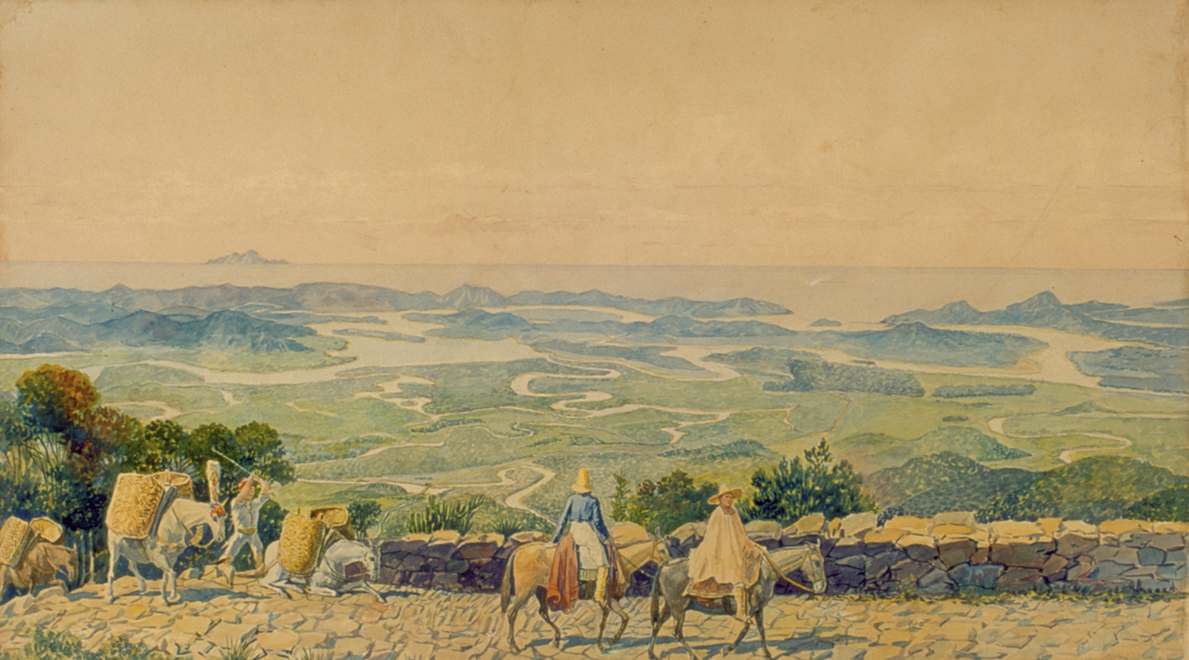 Obra que integra o acervo do Museu Paulista da USP.